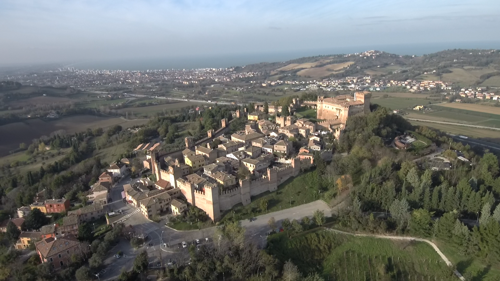 Cidade medieval de Gradara com ao fundo a cidade de Cattolica no Mar Adriático. Foto de Siloé Mascolo.